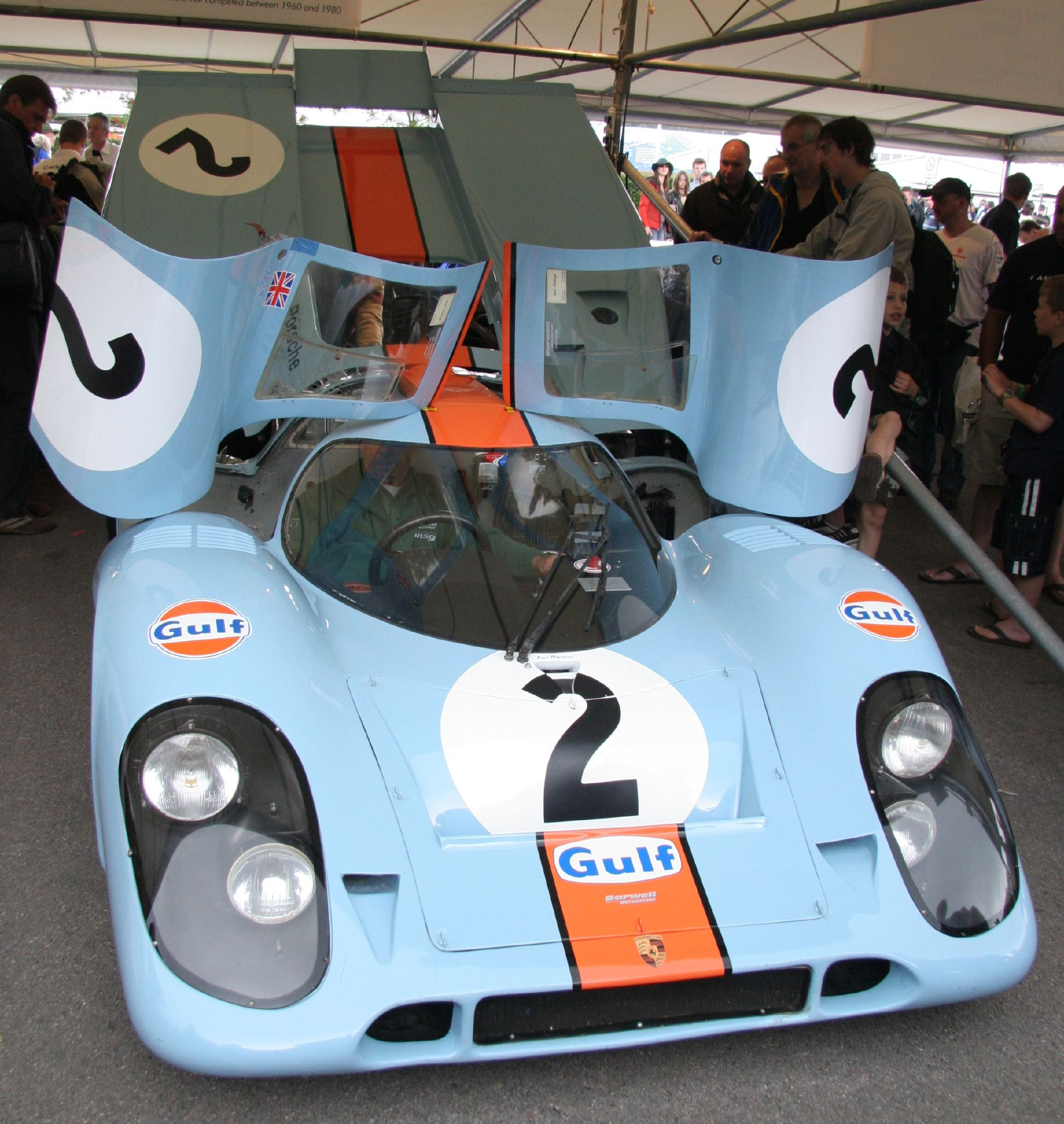 Porsche 917K 1970